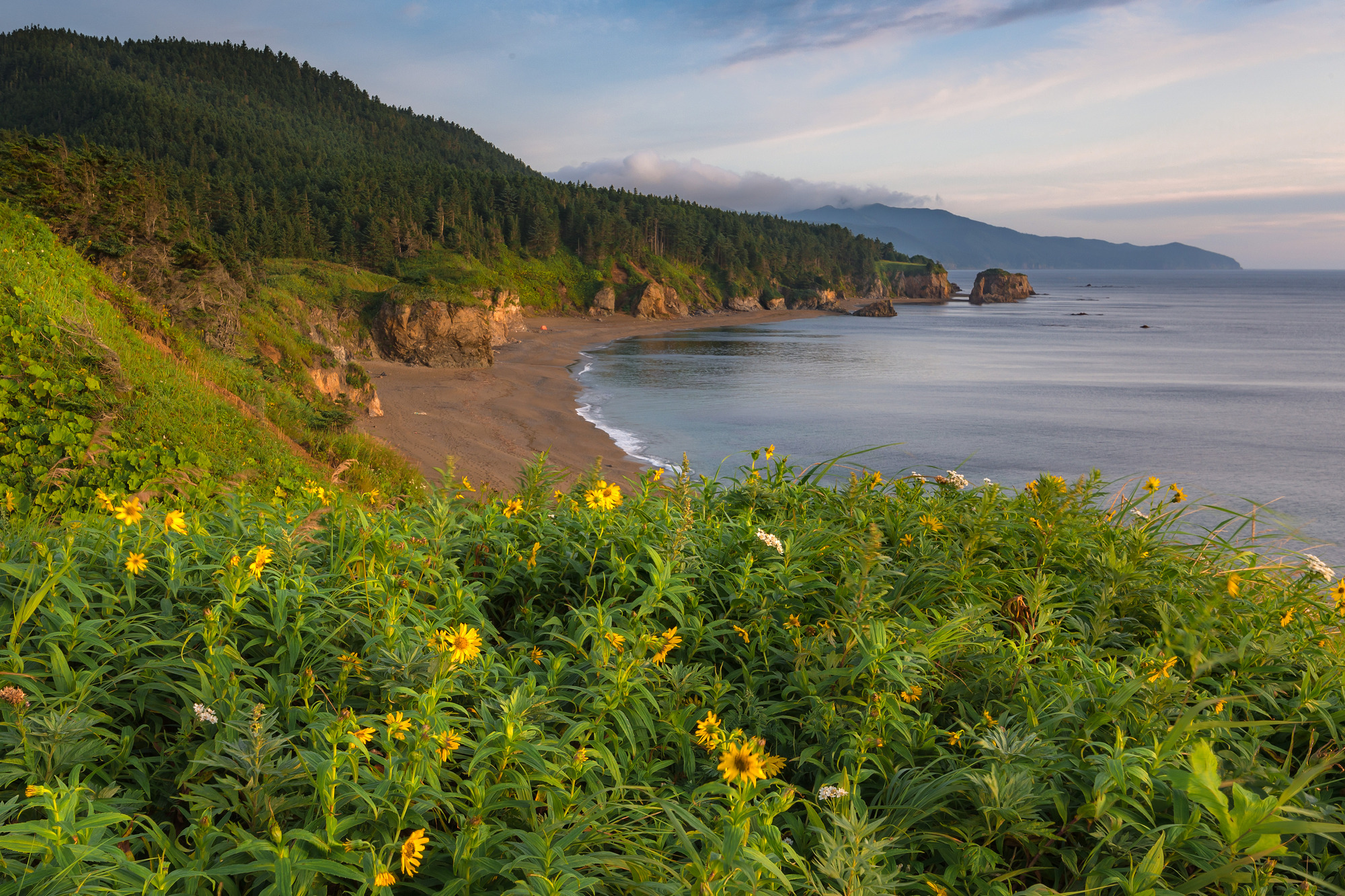 Мыс Великан: Юго-восток Сахалина, восточное побережье Тонино-Анивского полуострова. Географические координаты: Центр - 46°37'24" N 143°31'12" E., Корсаковский район, Сахалинская область This image is related to the protected area of Russia number 6510030